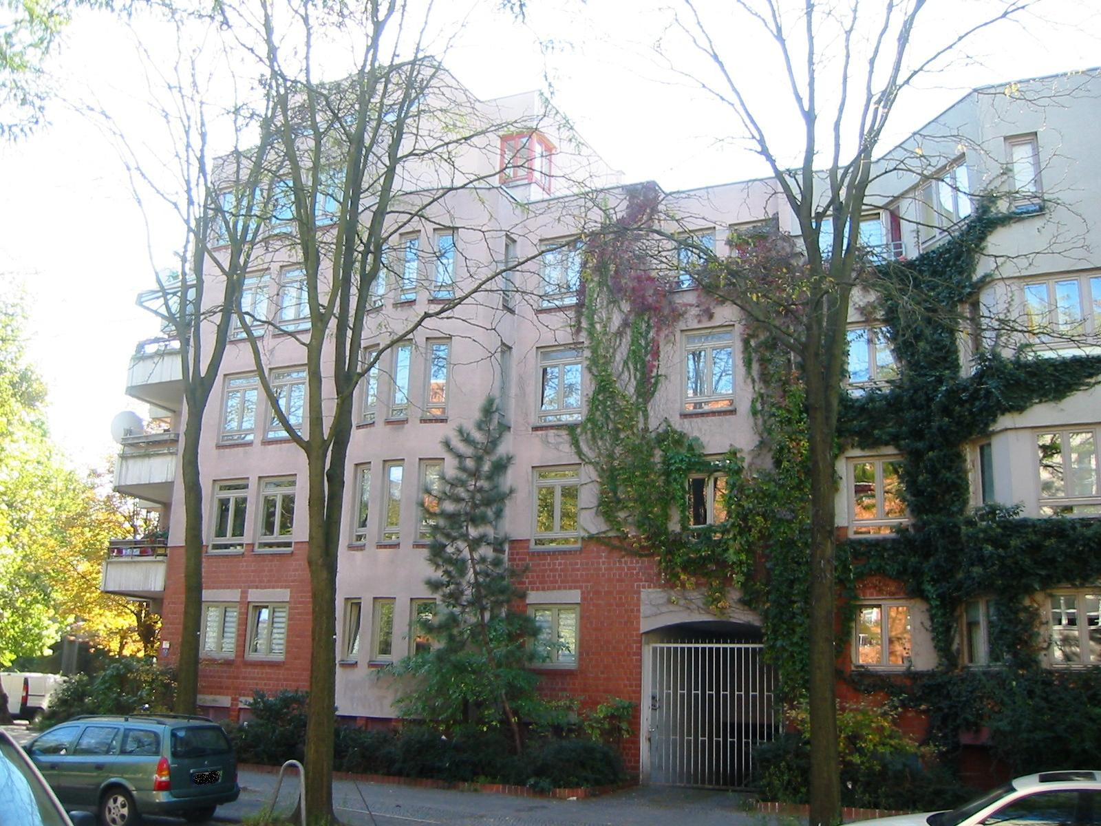 Blockecke Lindenstraße Ecke Alte Jakobstraße vom Planungskollektiv 1. Sie gehören zu einem Gesamtkomplex "Konzepta Ritterstraße", welches im Zuge der Internationalen Bauausstellung 1984 entstand.